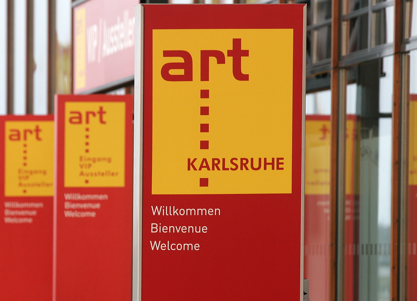 Art Karlsruhe